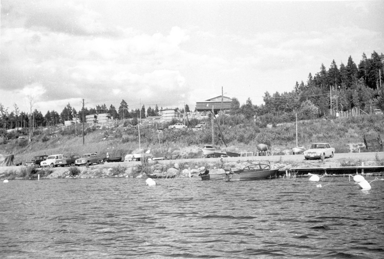 Jakobsbergs båtsällskaps båthamn vid Sandudden. I bakgrunden Viksjö såg, Viksjö, Järfälla.